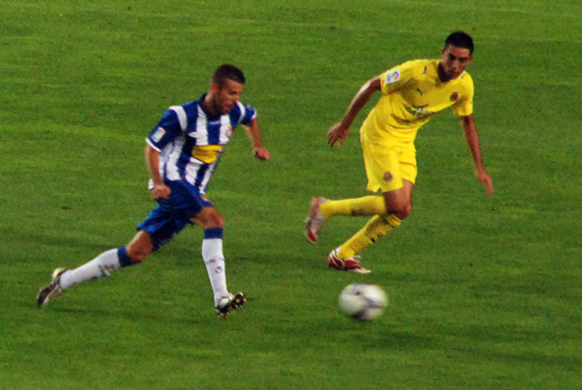 En el partido Espanyol-Villareal